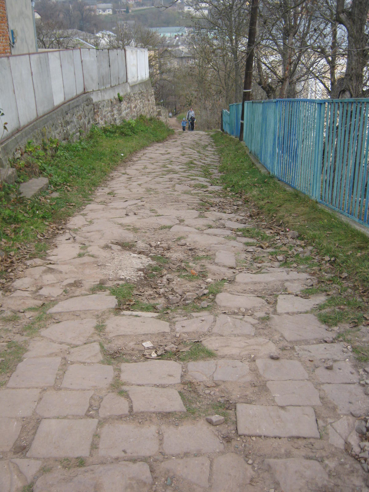 Стара доріжка до замку від костелу. Бучач